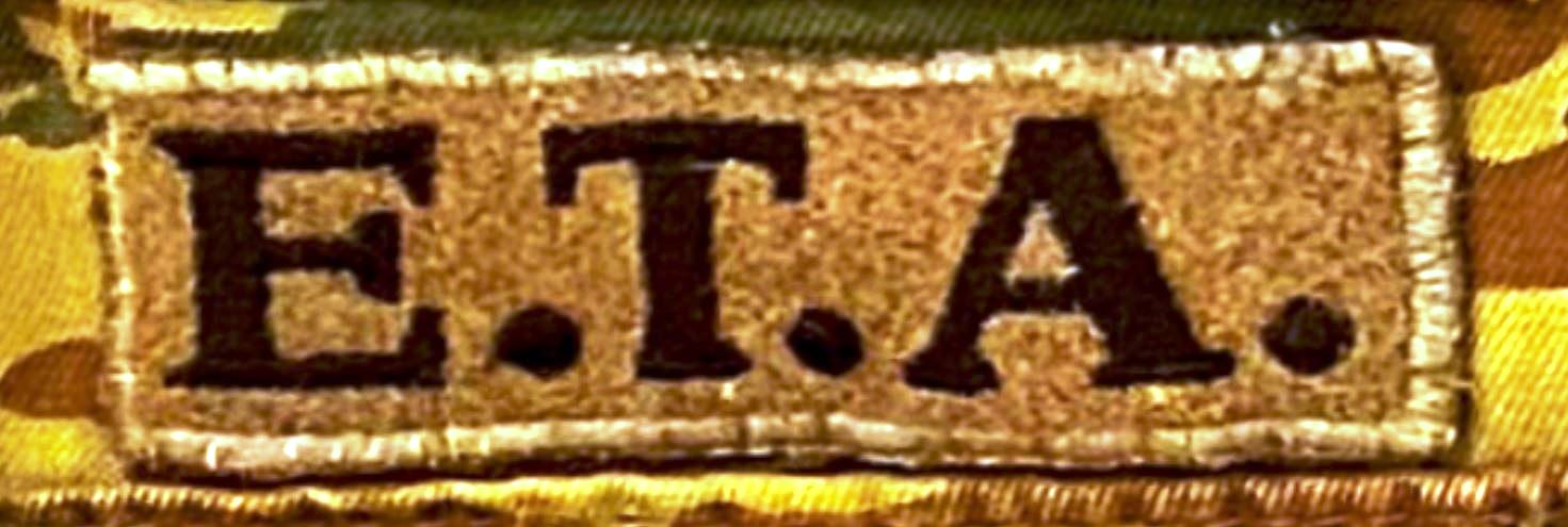 Το επίρραμμα "Ε.Τ.Α." των στολών παραλλαγής (αρ.9)